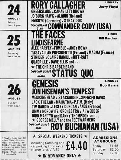 Reading-festivaalin vuoden 1973 esiintyjälista